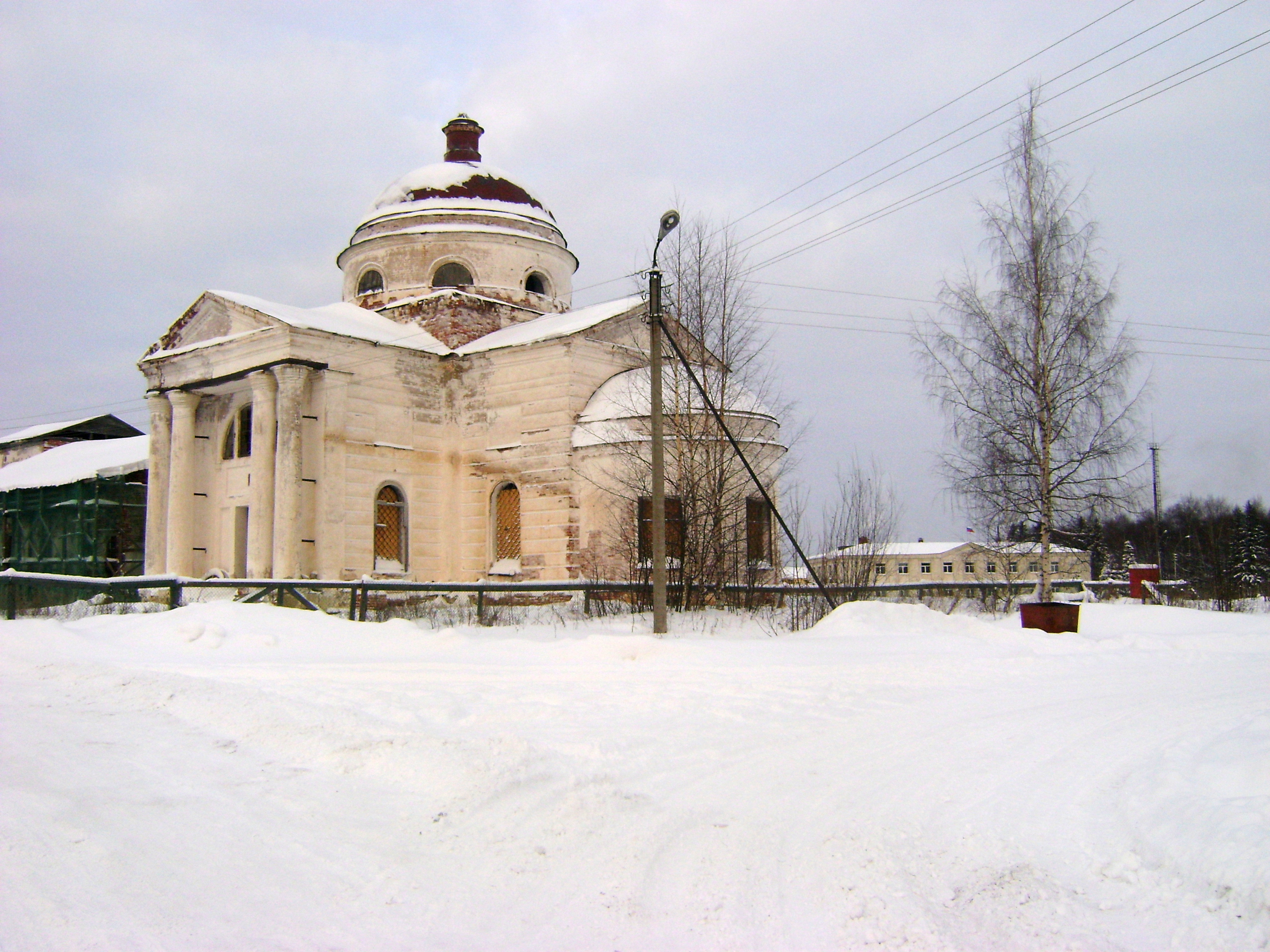 Казанский собор г. Кириллова, позади здание администрации